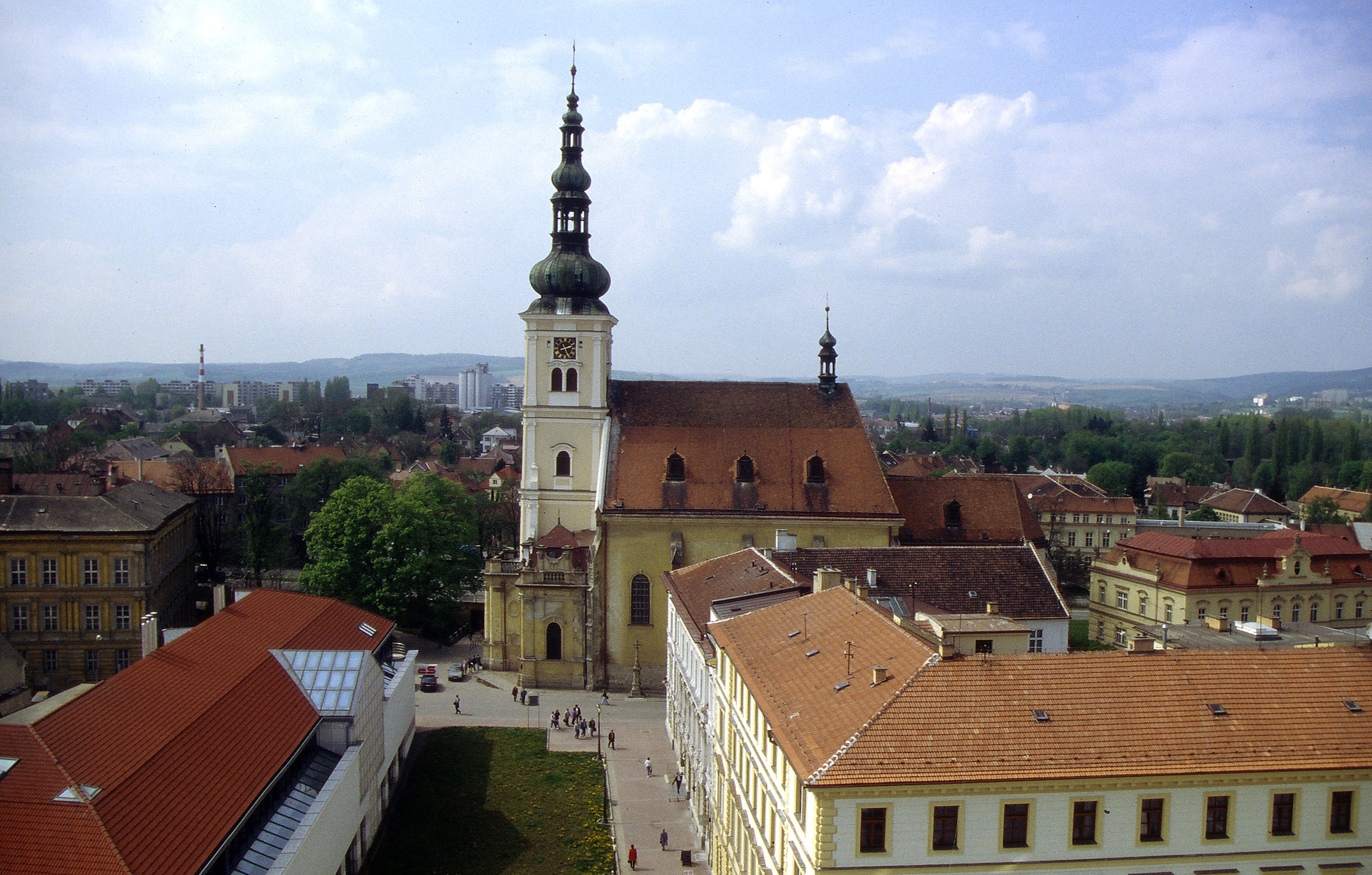 Eine Kirche in Vyškov, Tschechien